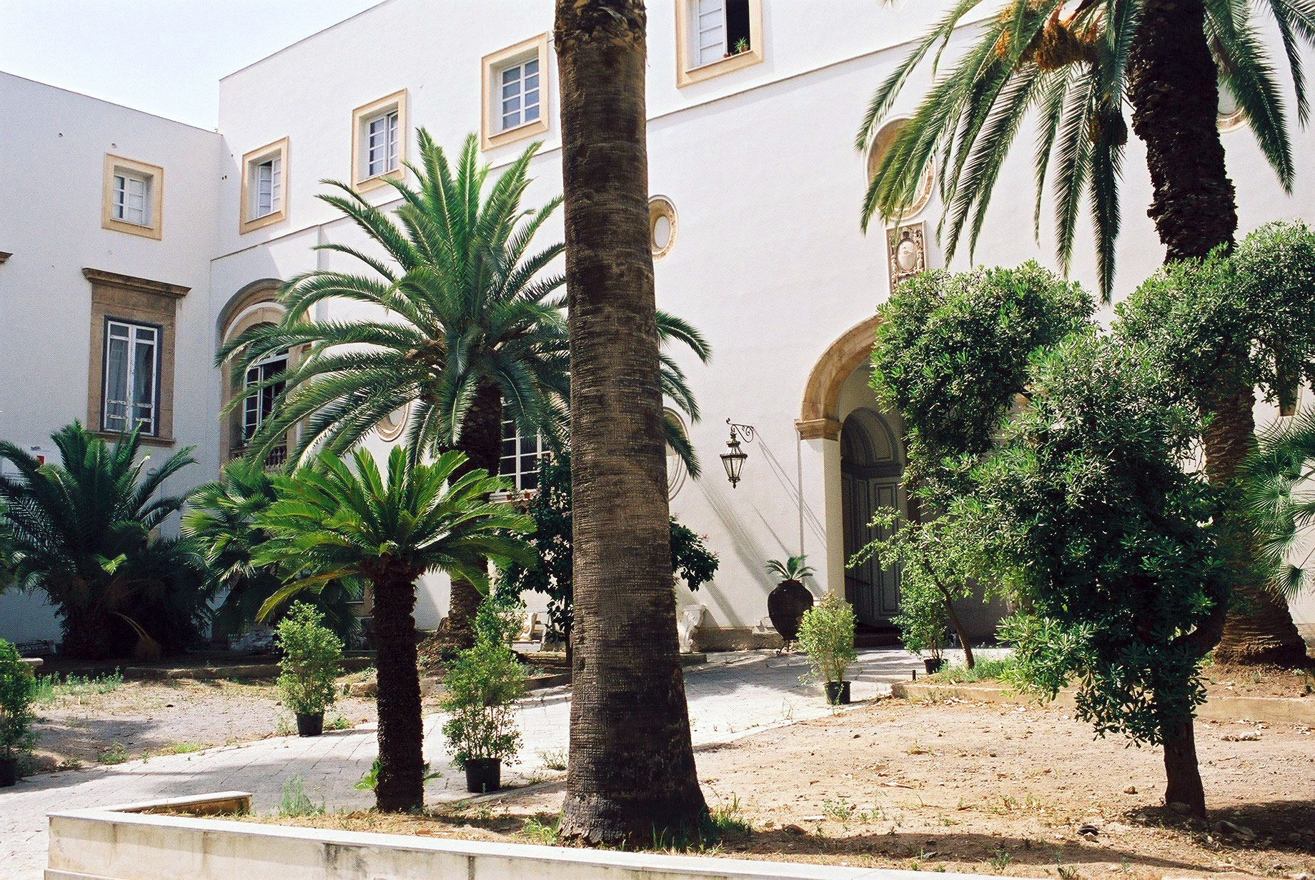 Palazzo Arcivescovile, Palermo Inner yard